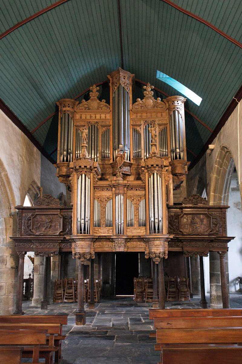 Enclos paroissial de Guimiliau (Classé)